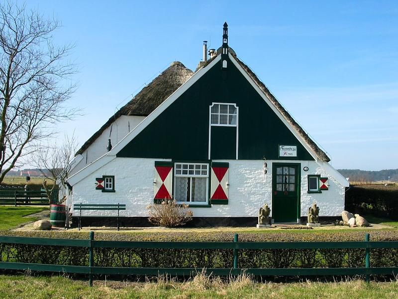 Torenhuis aan de Westerweg 78 te Den Hoorn (Texel)-RM 35233- Vroegere kosterswoning van de Westerkerk die in 1849 werd afgebroken. Gebouwd in 1578. Pas in 1857 als boerderij in gebruik - nu woning